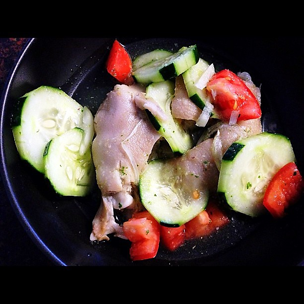 Chicken feet souse - Suppengericht der trinidadischen Küche, das traditionell sonntags als Frühstück gereicht wird (hier mit Hühnerfüßen).